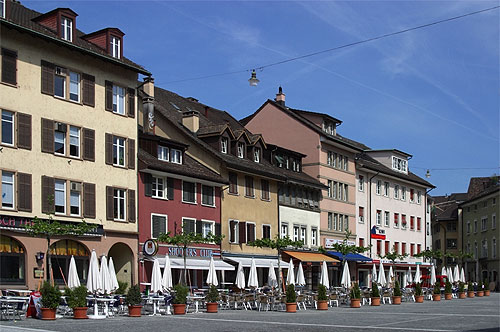 Blick auf eine Häuserfassade auf dem Neumarkt in der Altstadt von Winterthur (Nr. 03.1-5440)